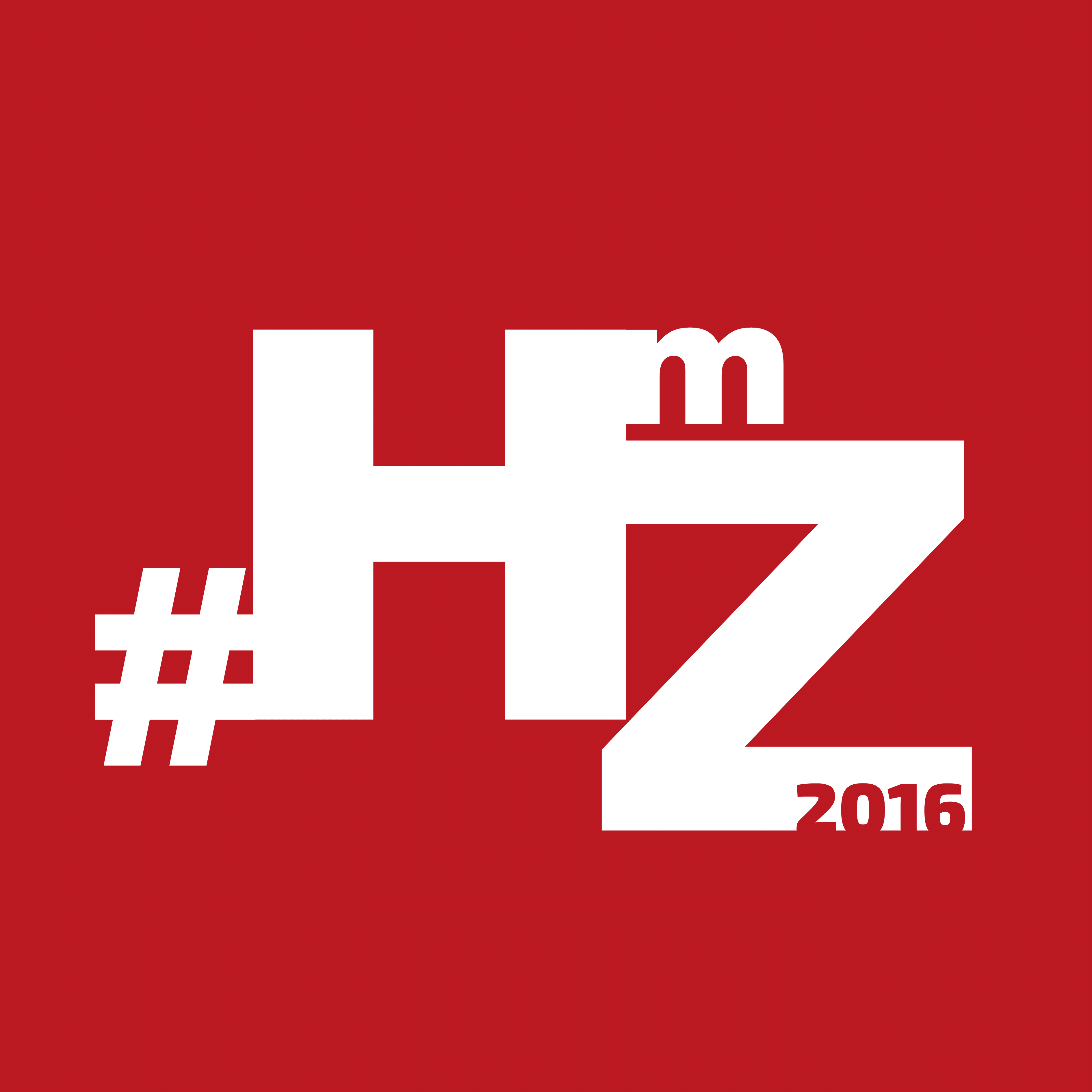 Jahreslogo der Jugendabteilung des TSV Selk "Haddeby macht ZELTLAGER!"